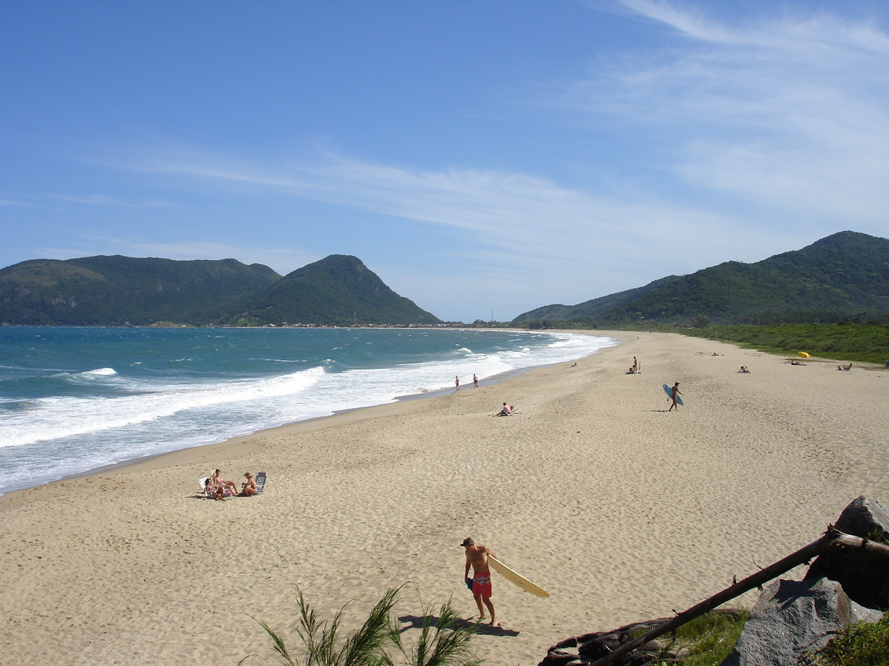 Florianópolis city, Santa Catarina state, Brazil. Praia do Morro das Pedras, sudeste da ilha de Santa Catarina (Santa Catarina island), by Herbert Vieira, january 2006.